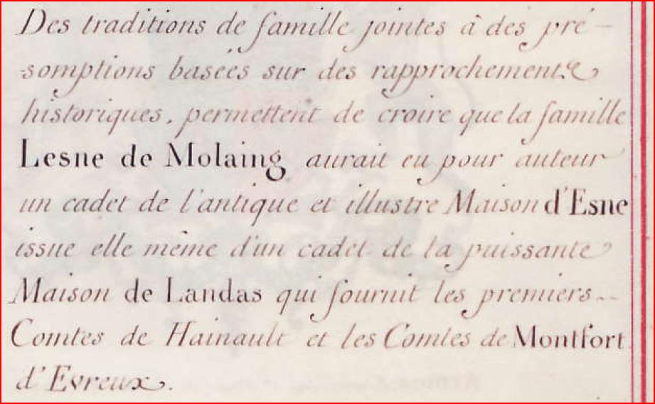 Le texte donne des informations sur les origines des Lasne (alias Launay)